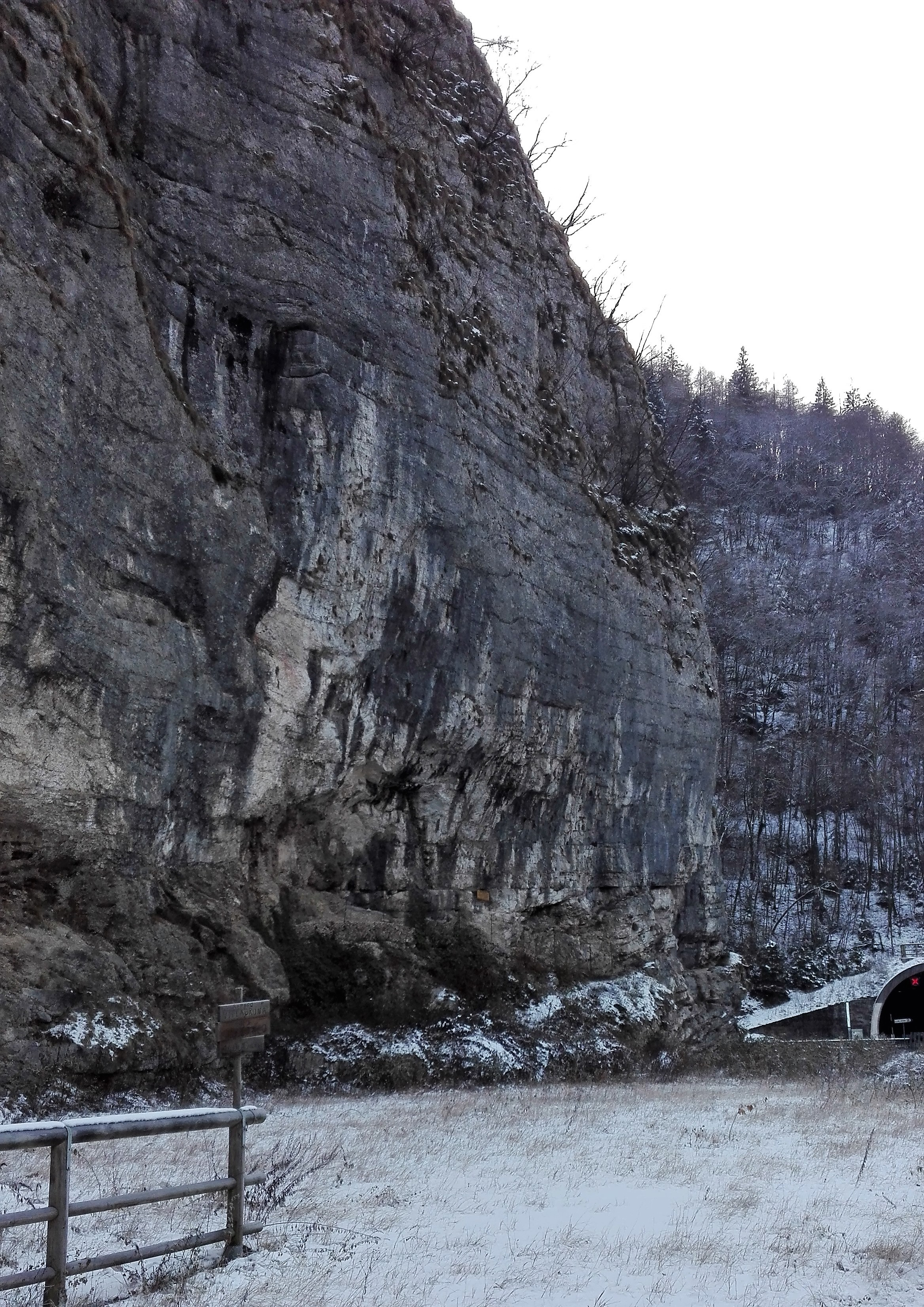 Luogo in cui è stata rinvenuta la sepoltura preistorica